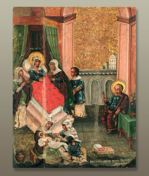 Нараджэнне Багародзiцы. 1649 г. З Магiлёва. НММ РБ.